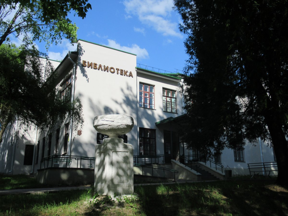 Горкі. Краявіды